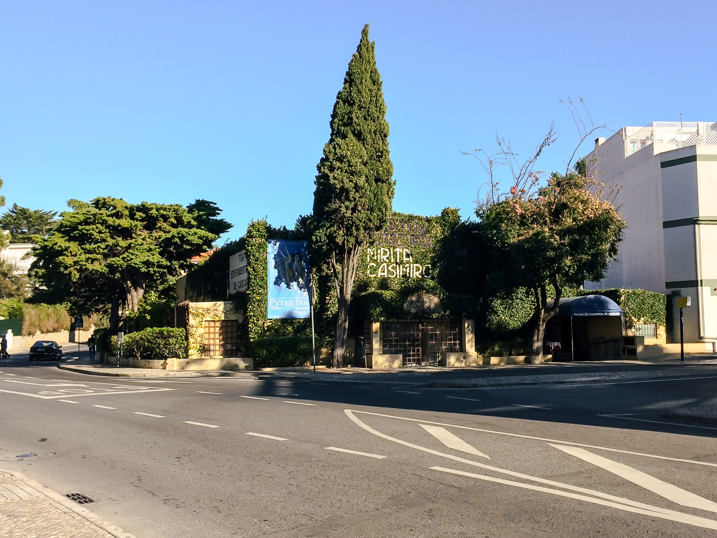 Edifício do Teatro Experimental de Cascais Mirita Casimiro, no Monte Estoril.